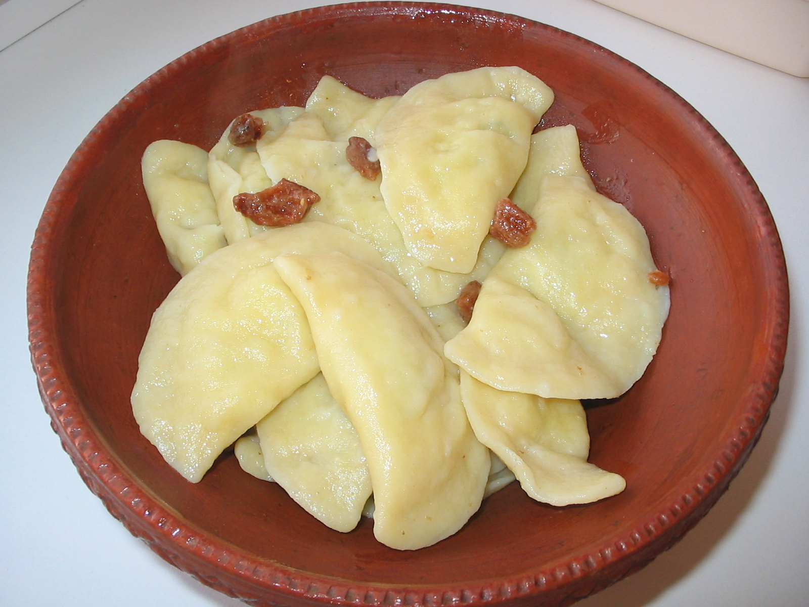 вареники з картоплею та шкварками. страва української кухні